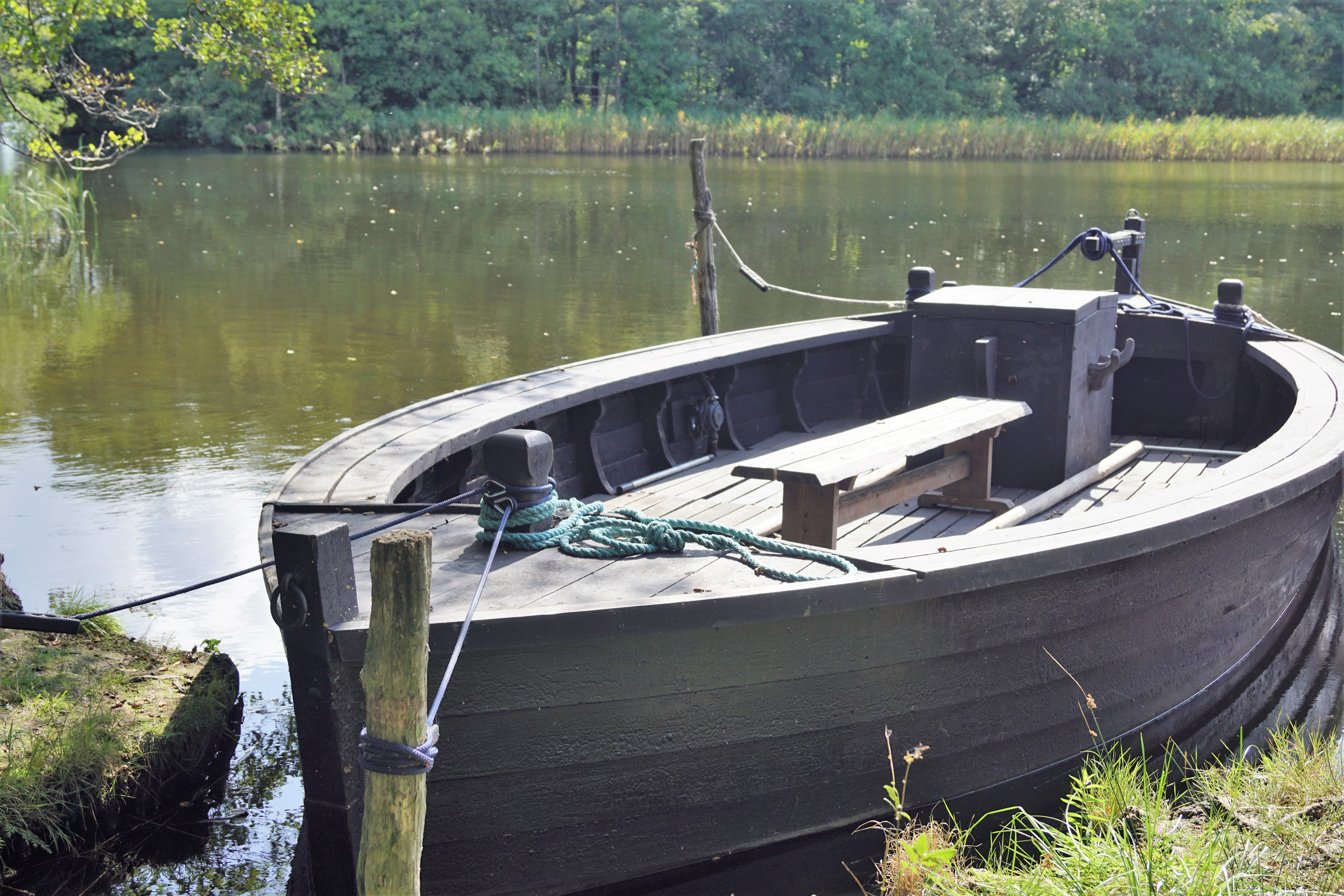 Kaagen "Christine" i Vejlsø